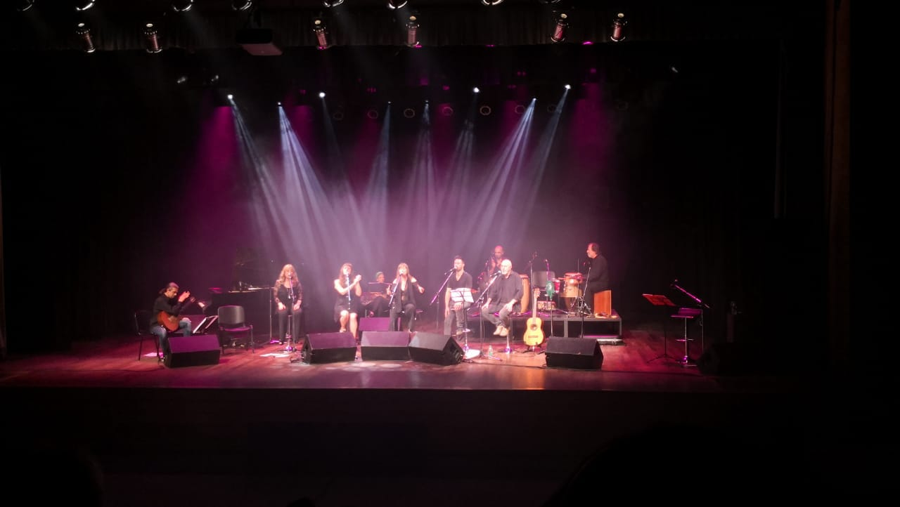 Marcelo Stenta (guitarra), Gabriela Rivoira, Sofía Rodriguez, Irene Rodriguez, Mariano Pistono y Raul Rey, en la presentación del disco doble "Allí está" el Centro Cultural Príncipe de Asturias, Rosario, Santa Fe, en 2018.